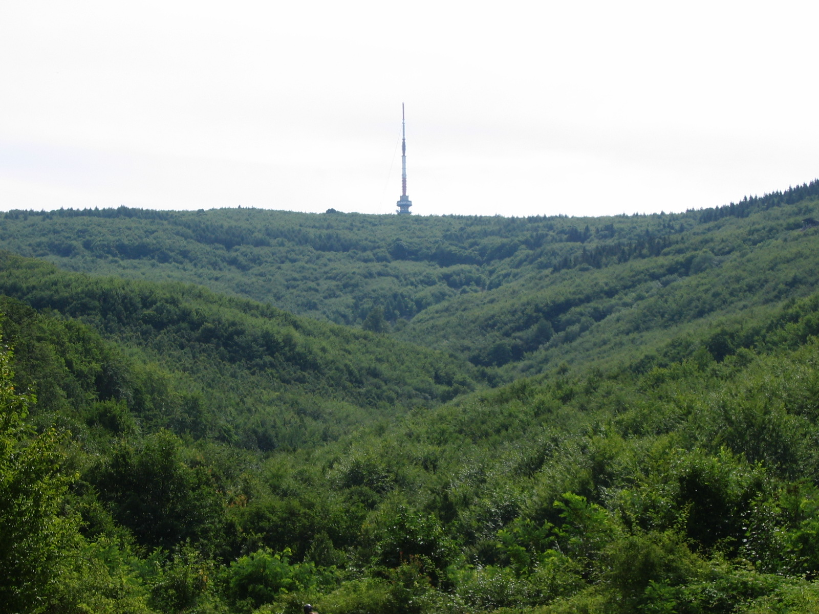 Kékestető